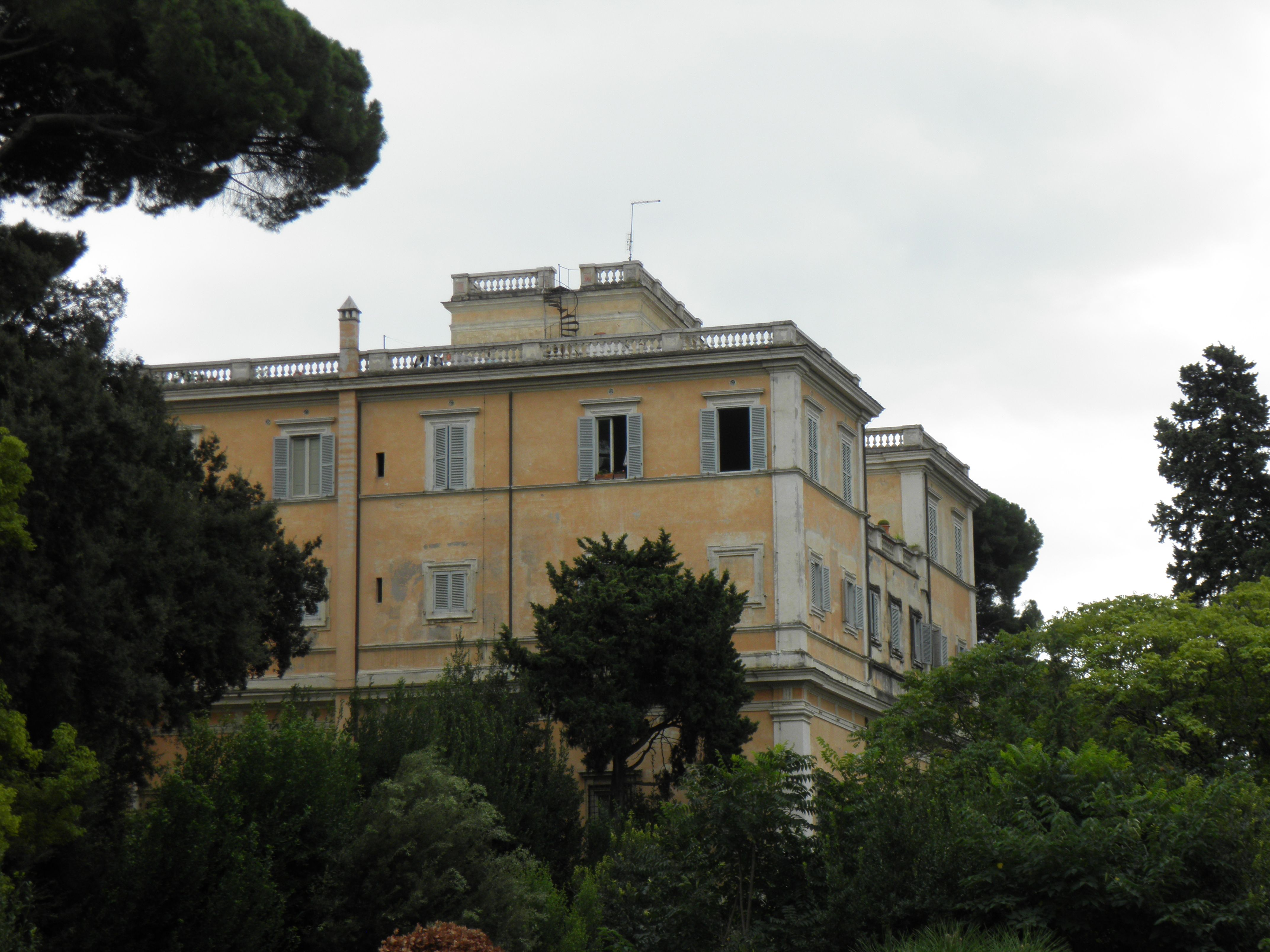 Villa Celimontana à Rome (Italie).